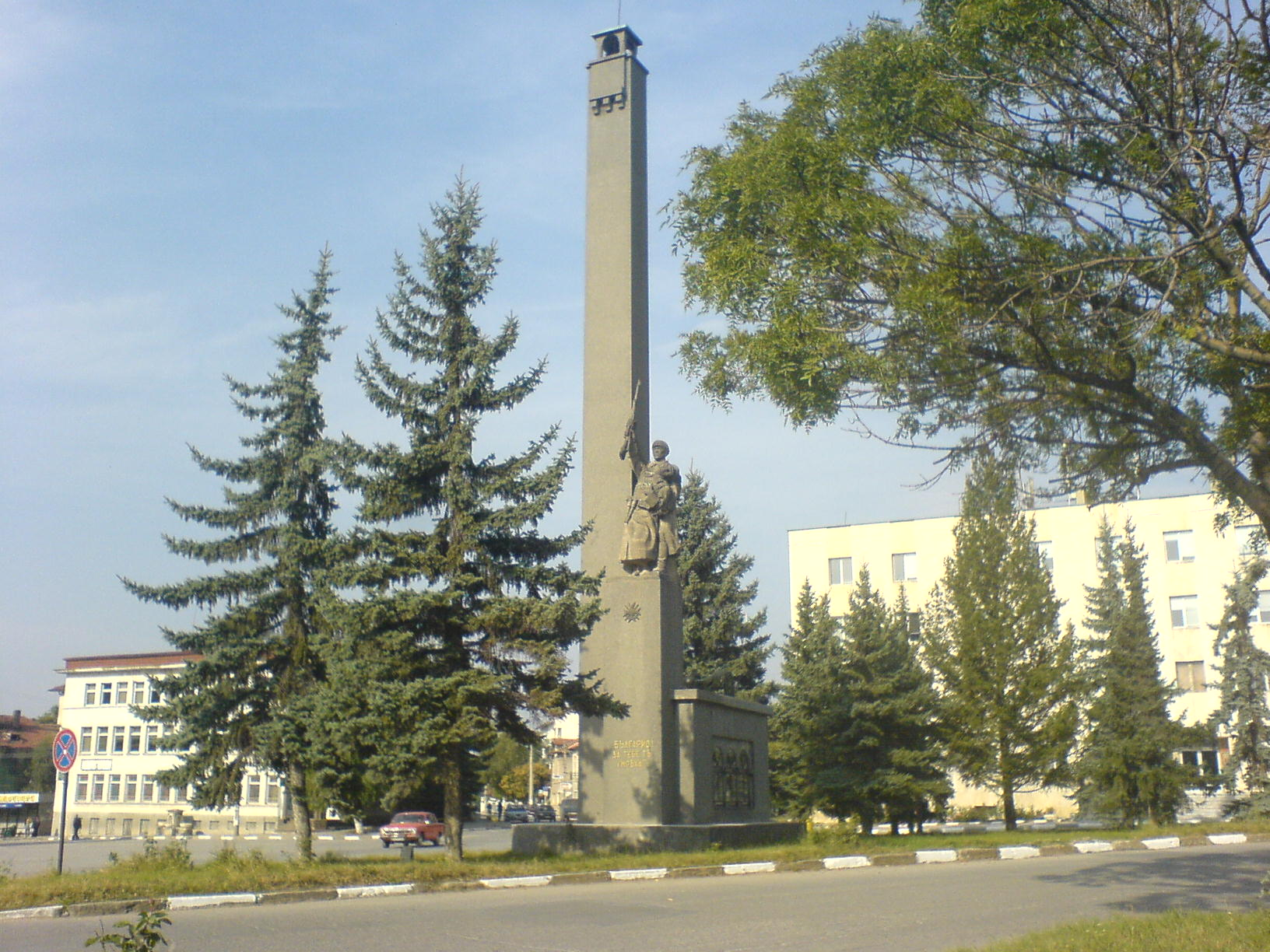 Паметника на загиналите в сръбско-Българската война, Сливница 2006. Autor: Бисер Тодоров